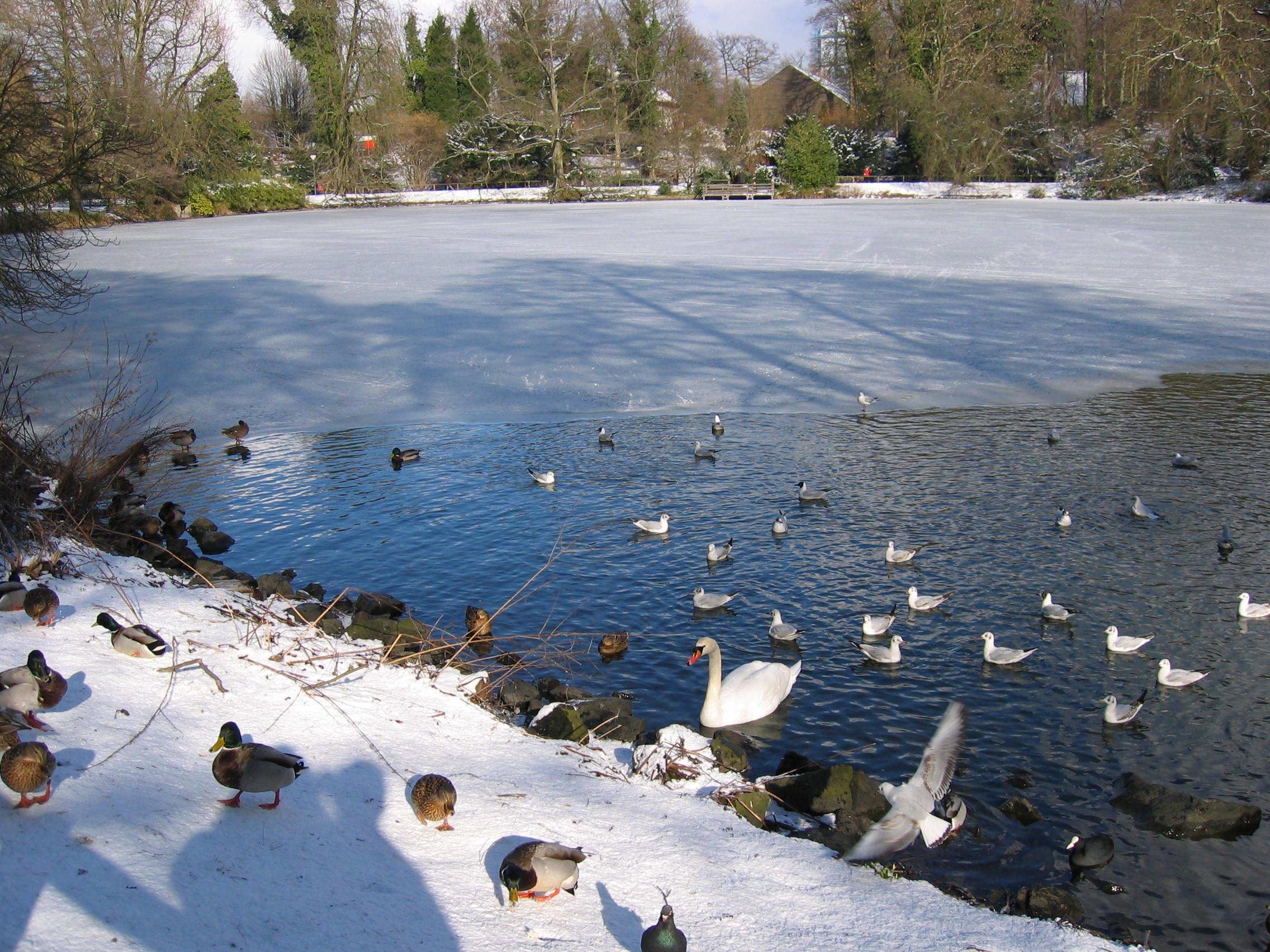 Rombergpark, Dortmund im Winter. See im Rombergpark ist zugefroren.